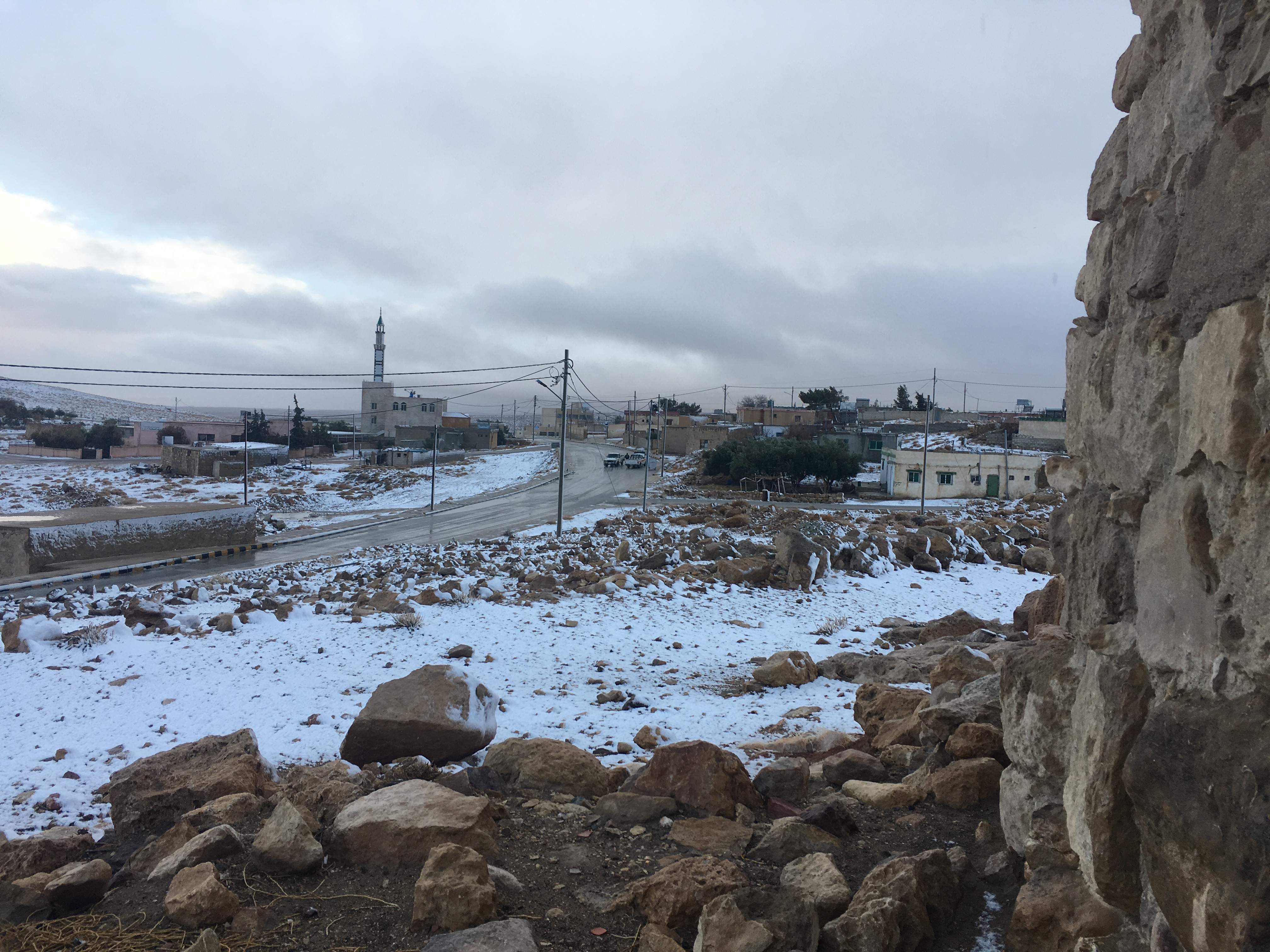 الثلوج تغطي قرية (الصدقة) في محافظة معان جنوب الأردن من تصويري يوم 25-1-2018 عبدالكريم الحويطي Template:Wiki Loves Earth Jordan